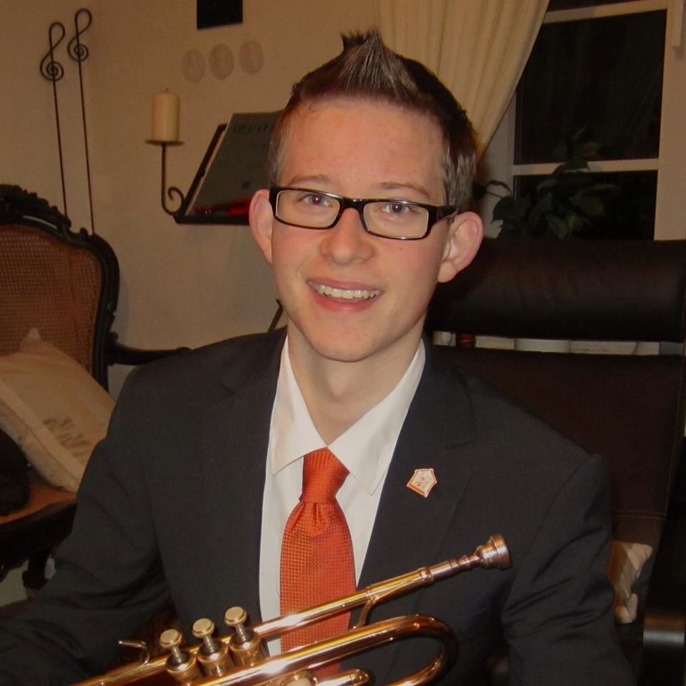 Trompeter Marquardt Petersen am 01.02.2014 nach seiner Ernennung als Botschafter des Bundesverbandes Kinderhospiz